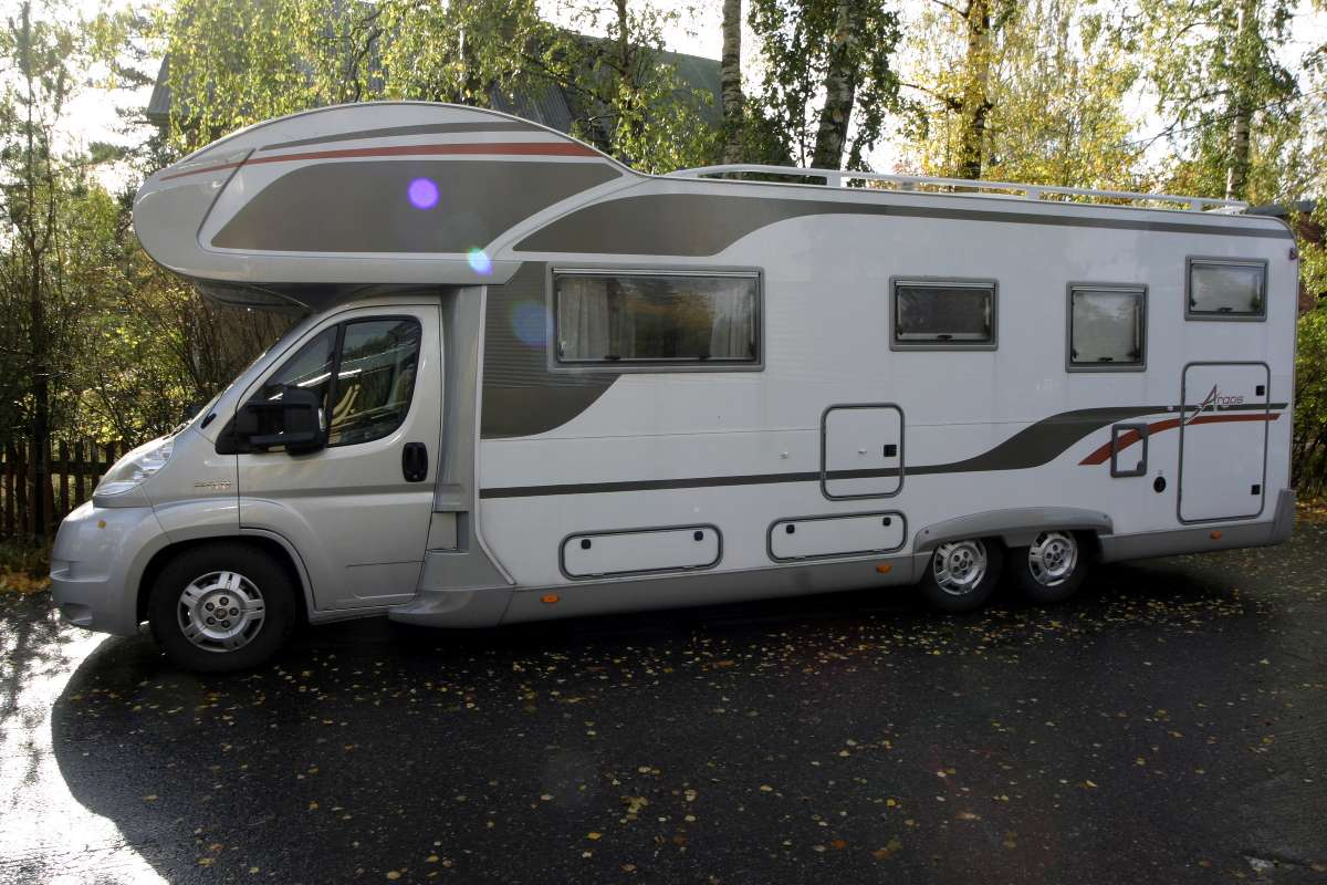 Alkovi matkailuauto teliakselilla, malli Burstner Argos A747-2 vm 2008, runko Fiat Ducato Maxi, kok paino 5000 kg, pituus 8,95m, korkeus 3,25m